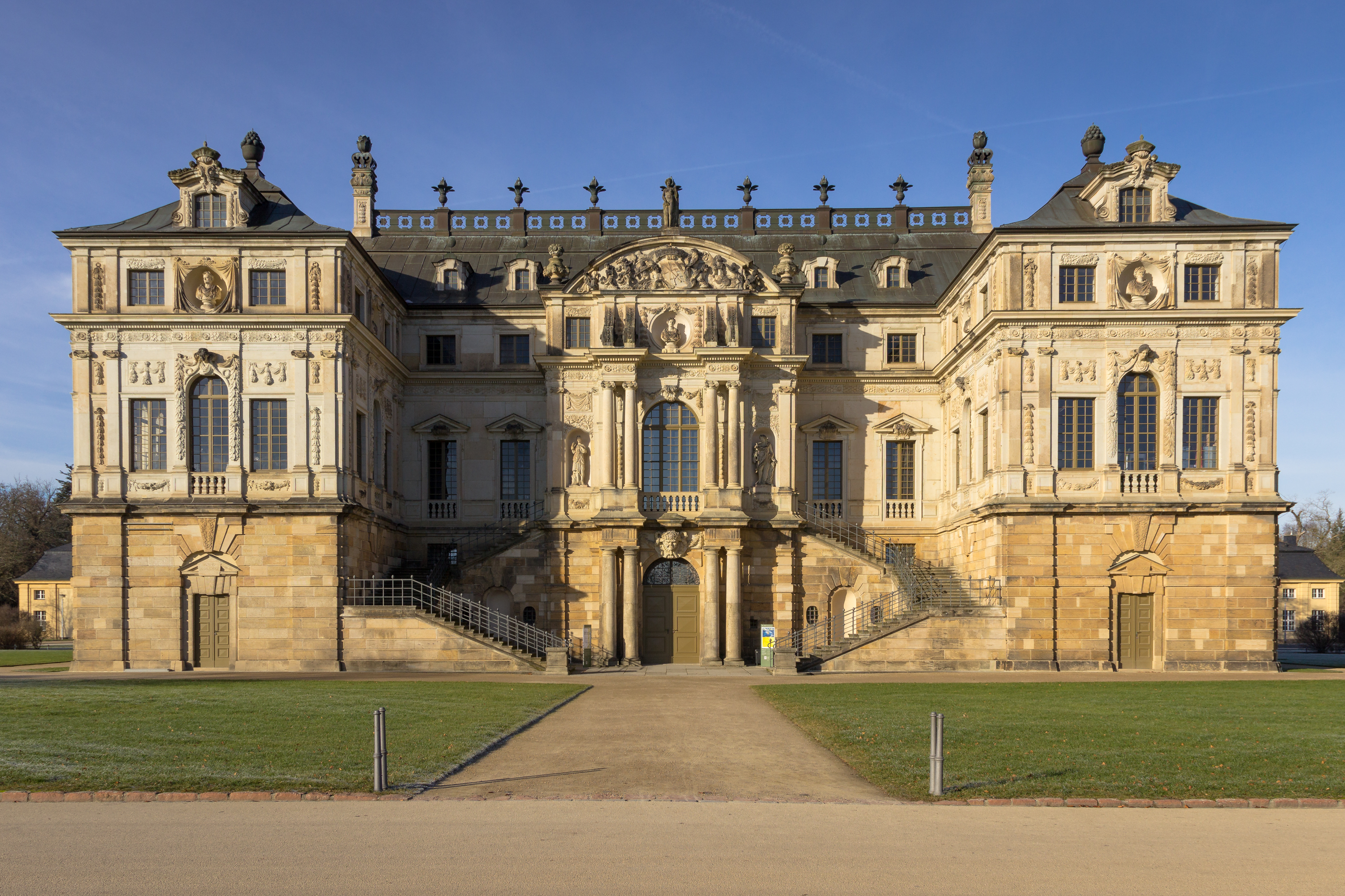 Palais Großer Garten - Dresden, Sachsen, Germany